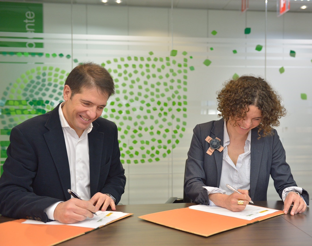 Firma y acuerdo de colaboración